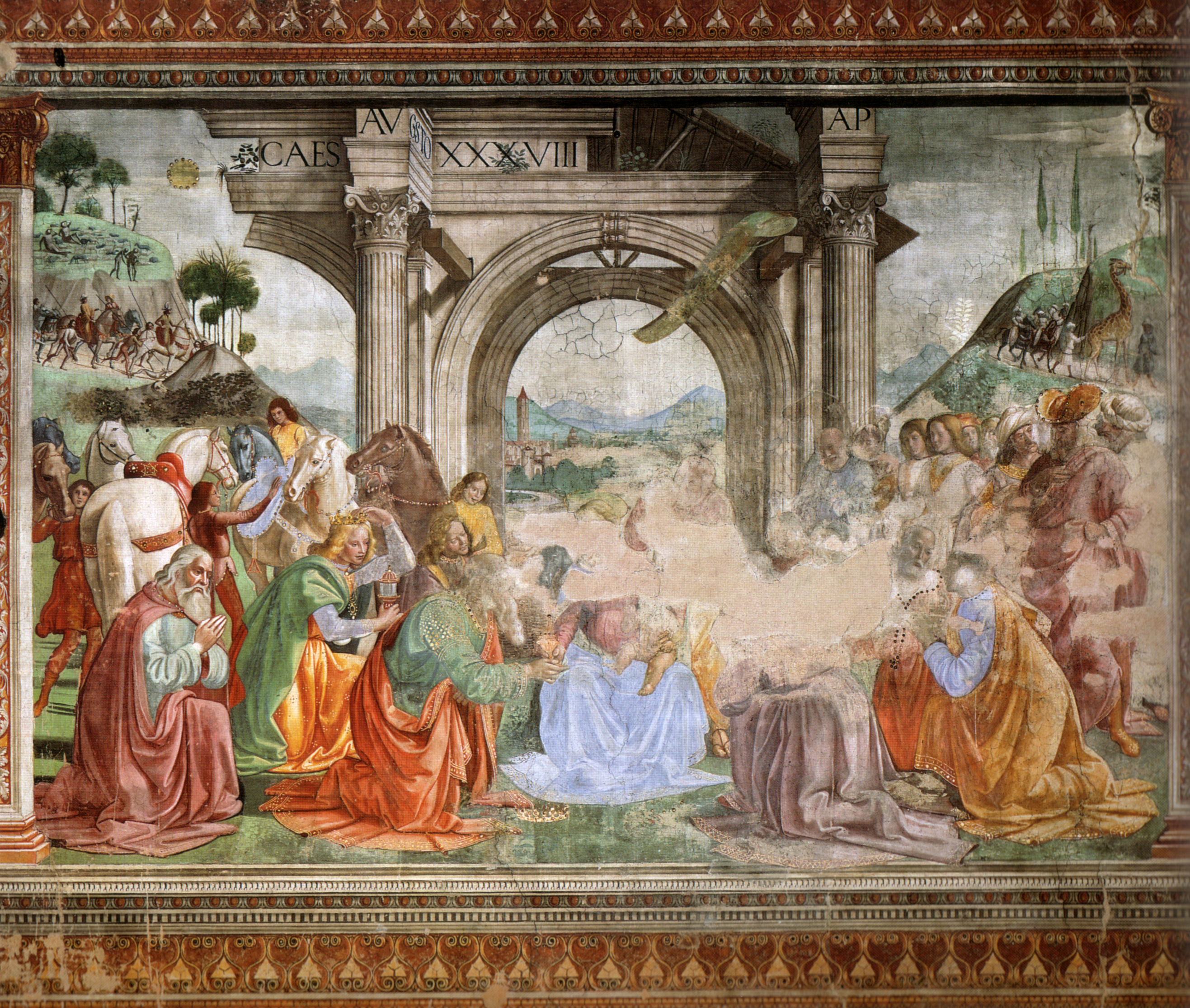 cappella tornabuoni frescoes in florence